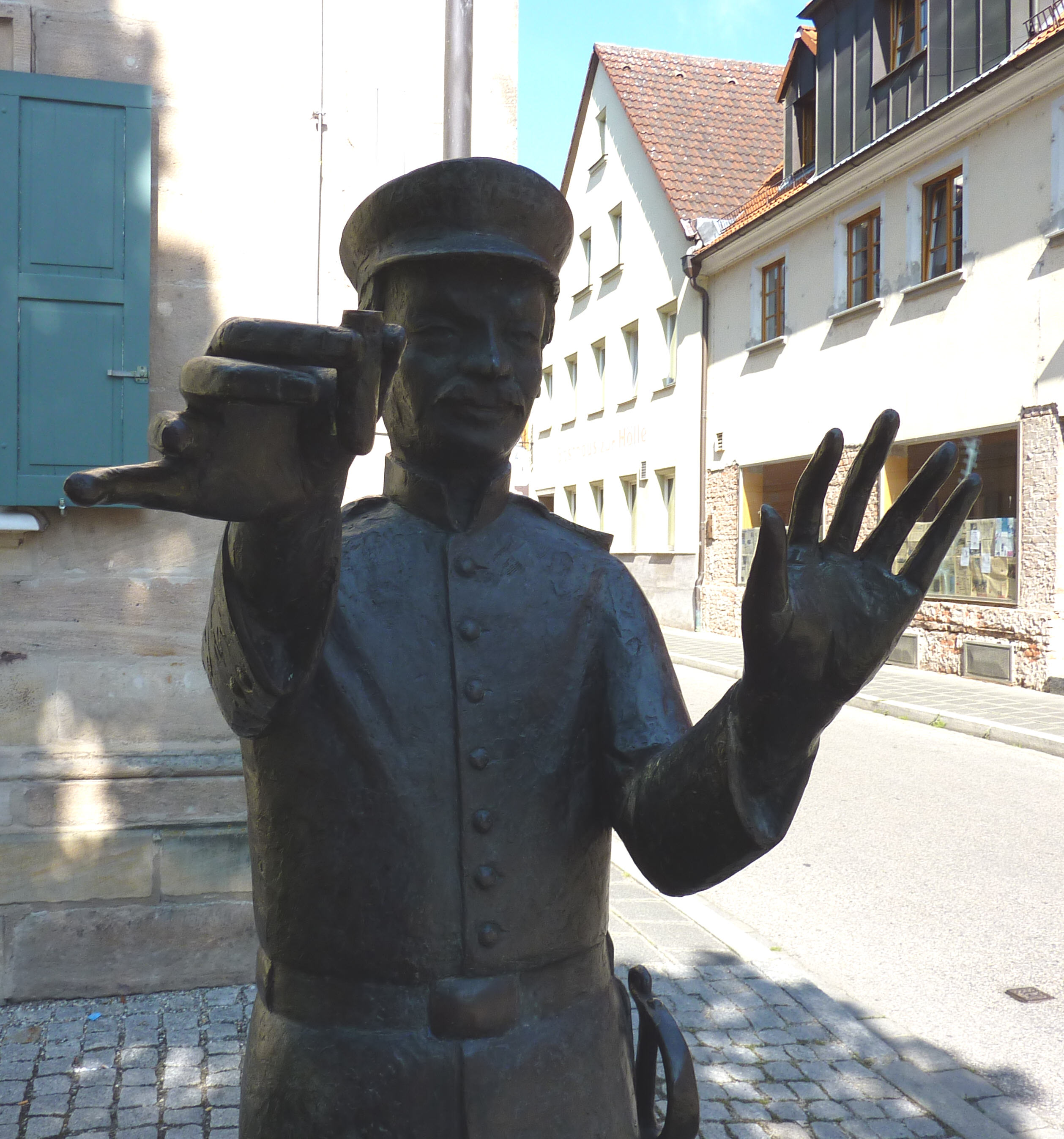 Denkmal für den Schöpfer des bayrischen Defiliermarschs Scherzer